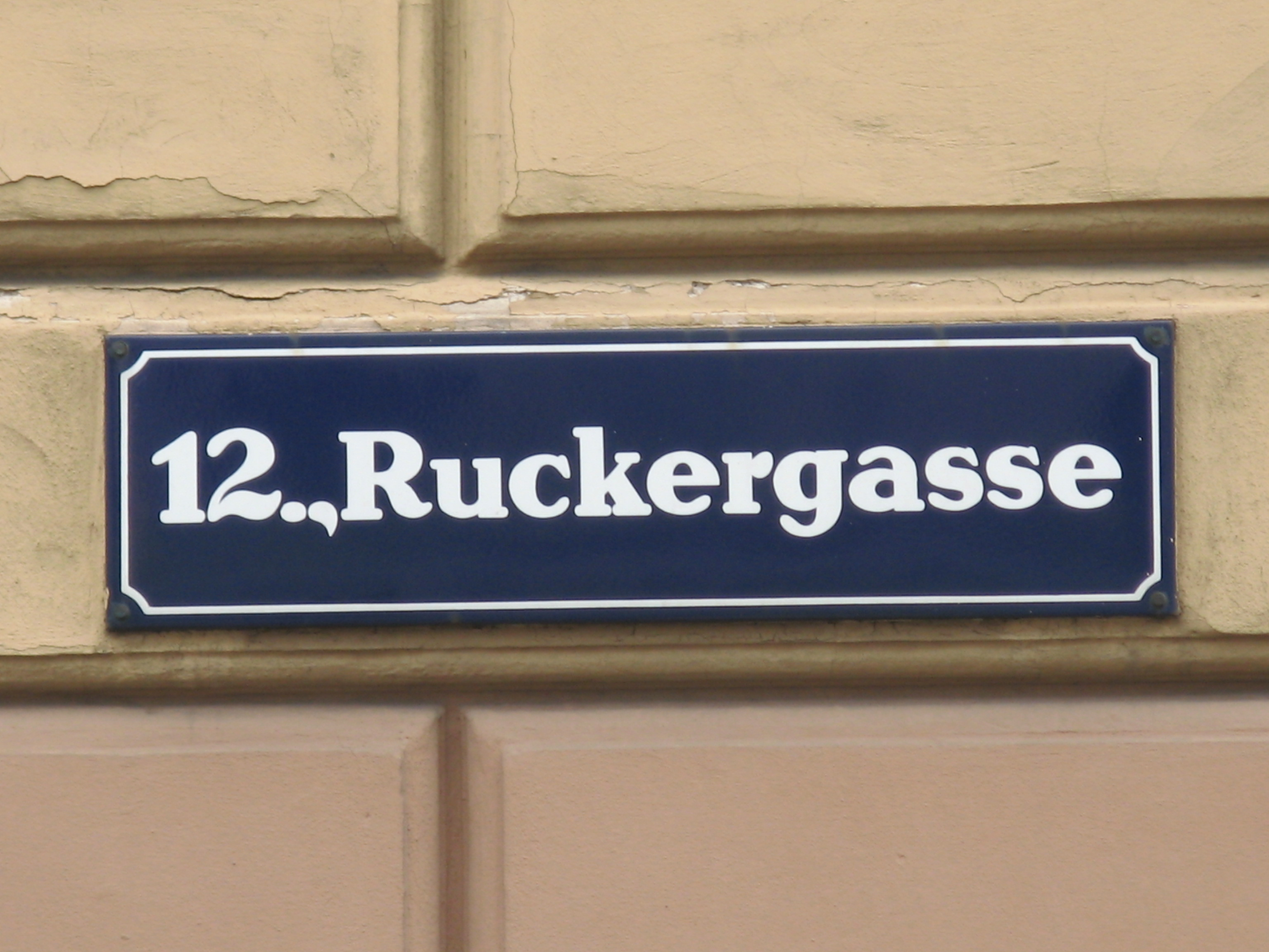 Straßentafel Ruckergasse, Wien-Meidling